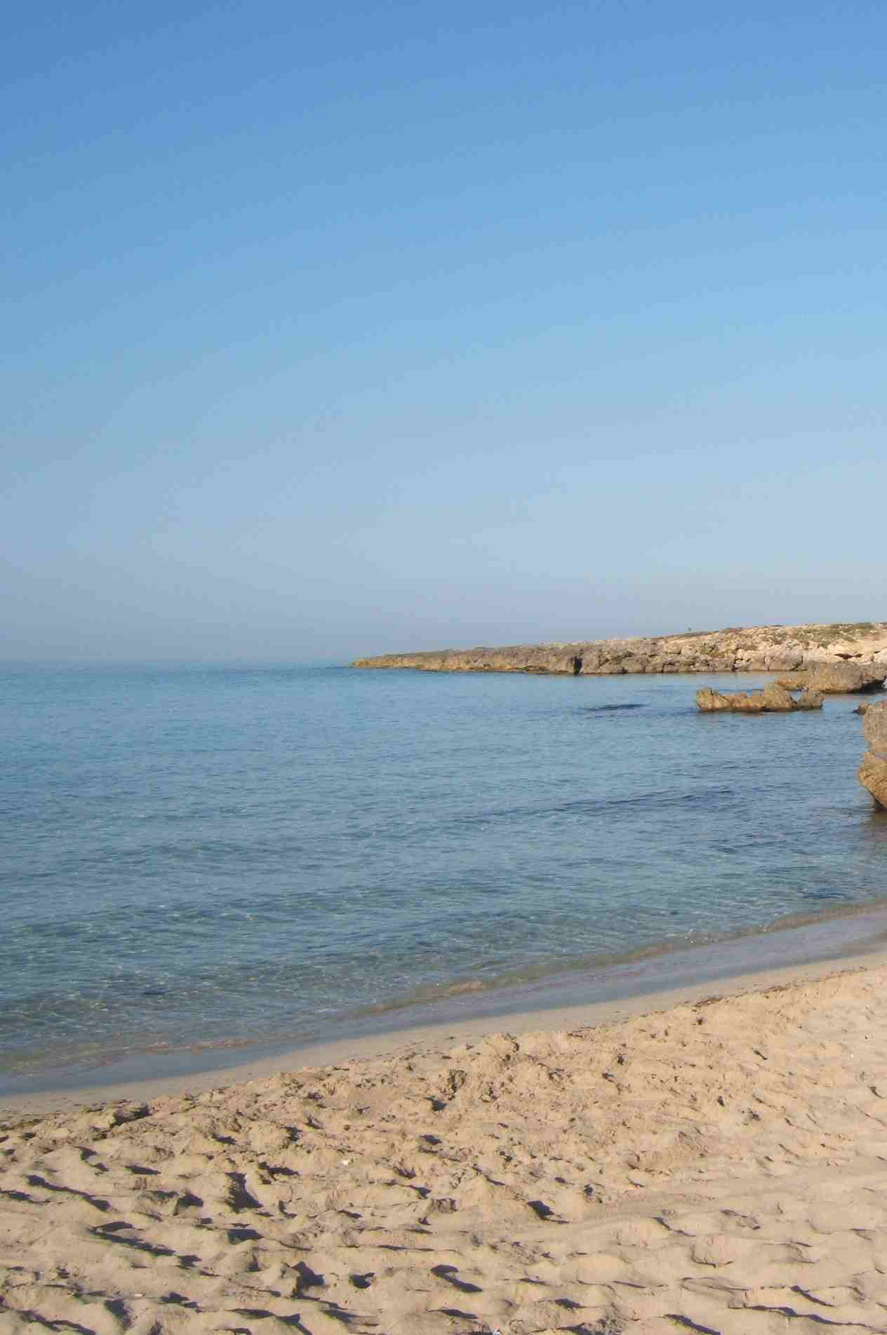 scorcio della spiaggia di Montedarena